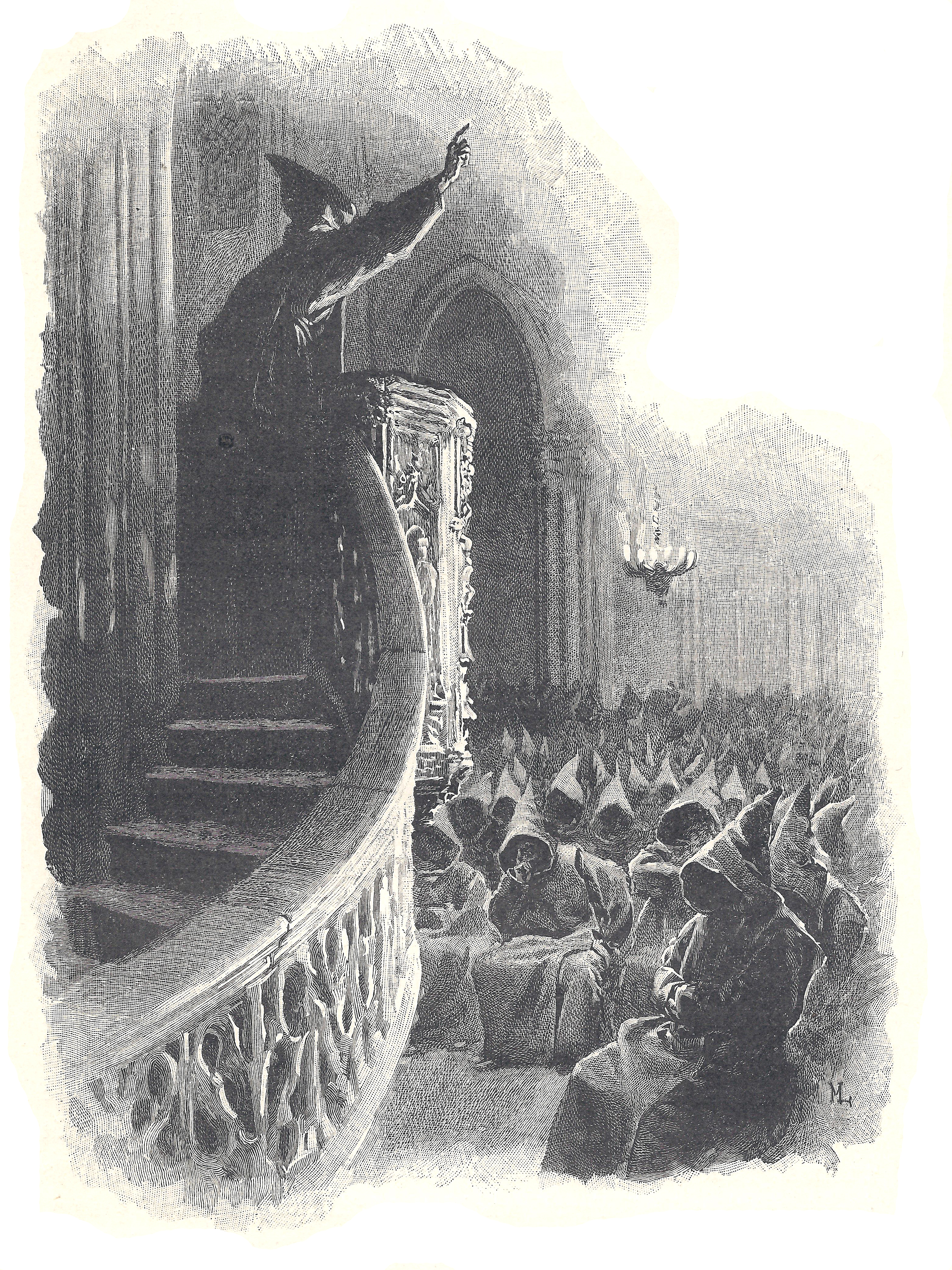 composition de Maurice Leloir et gravure sur bois de Jules Huyot se trouvant p. 249 : "Mes frères, dit Chicot, en imitant la voix du moine, je suis le frère quêteur de ce couvent."